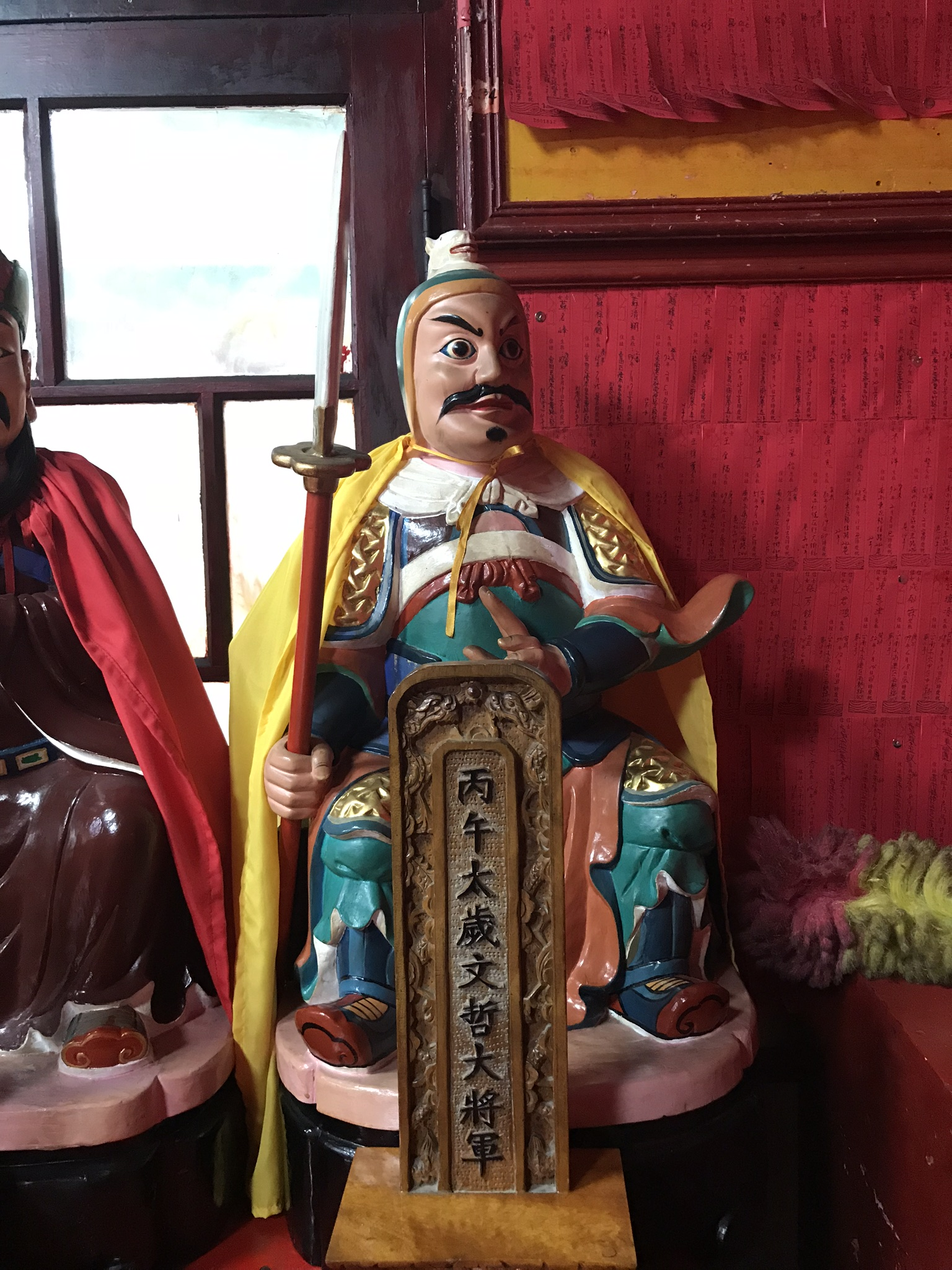 丙午太歲文哲大將軍神像